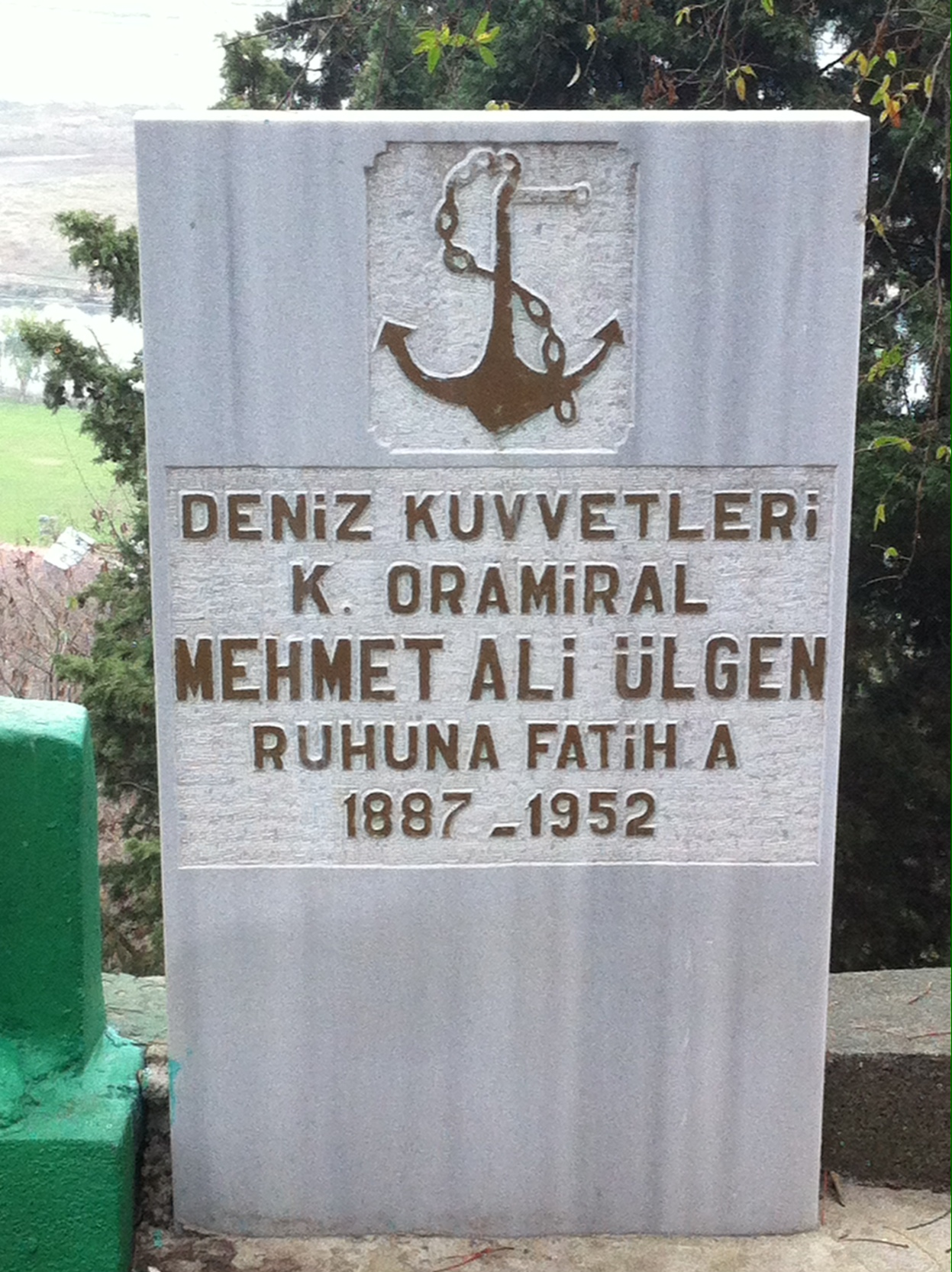 İlk Türk Deniz Kuvvetleri Komutanı Mehmed Ali Ülgen Mezar Taşı